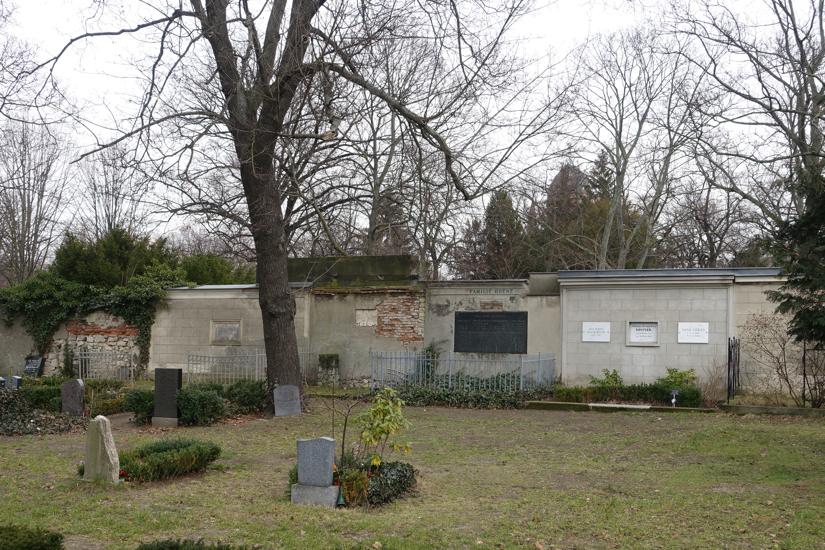 Bethlehemsfriedhof, Berlin-Kreuzberg, vor dem Halleschen Tor